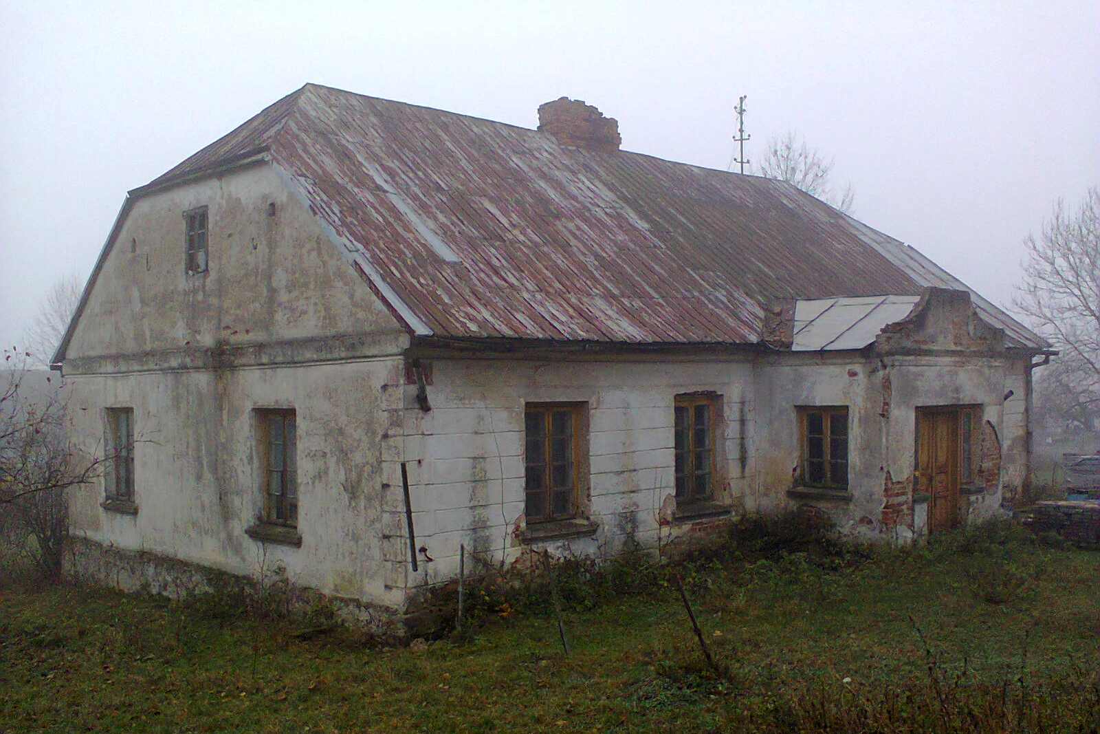 Stara plebania w Romanach z roku 1860.